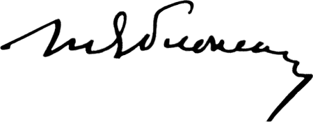 Підпис художниці Тетяни Нилівни Яблонської